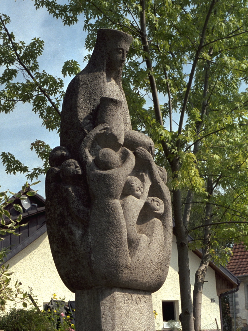 Heilige Notburga von Bühl. Wallfahrtsort Bühl (Klettgau) in Baden-Württemberg. (Bildhauer Siegfried Fricker)